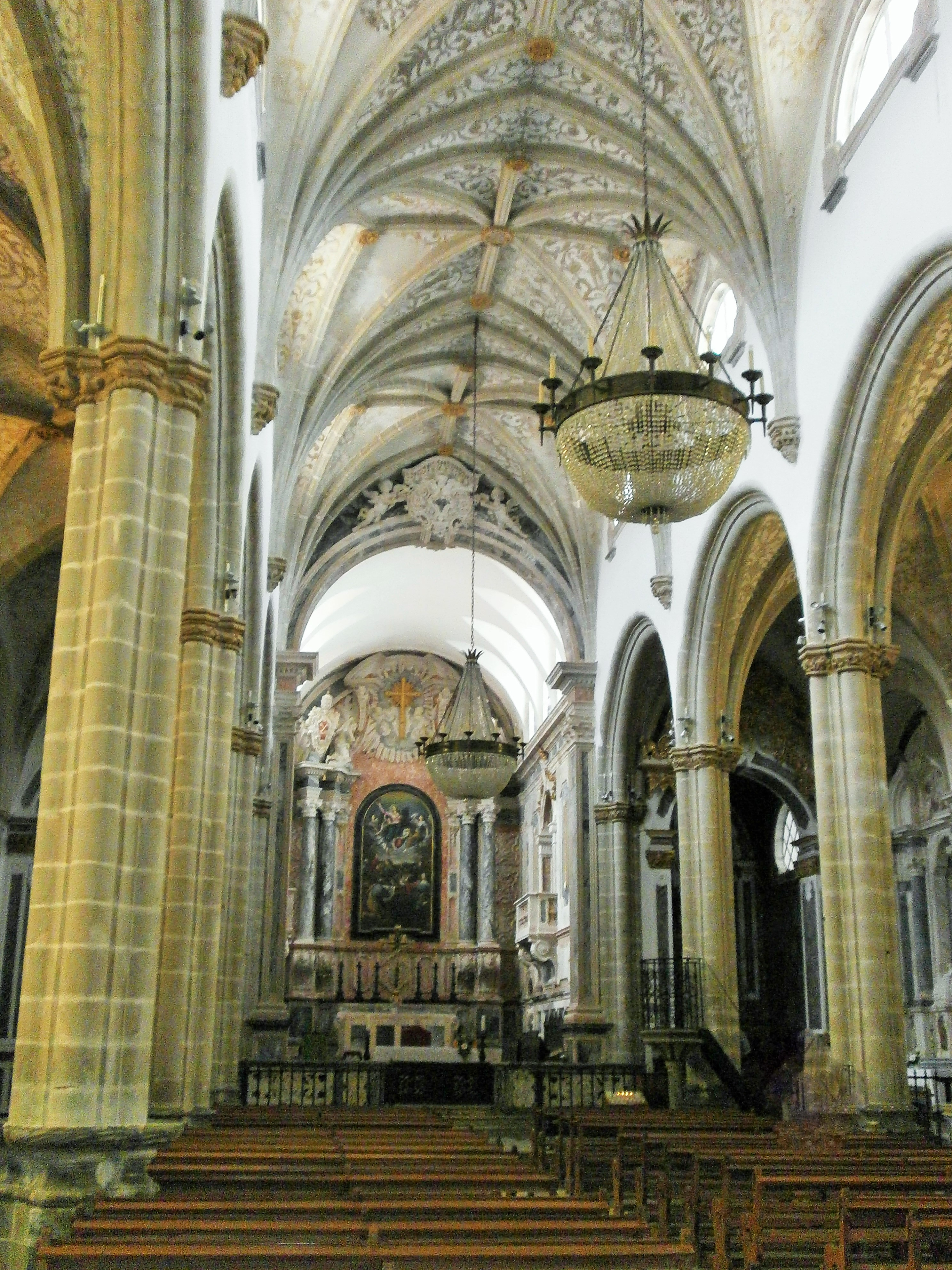 Iglesia de Nuestra Señora de la Asunción. Elvas, Portugal. Nave principal.